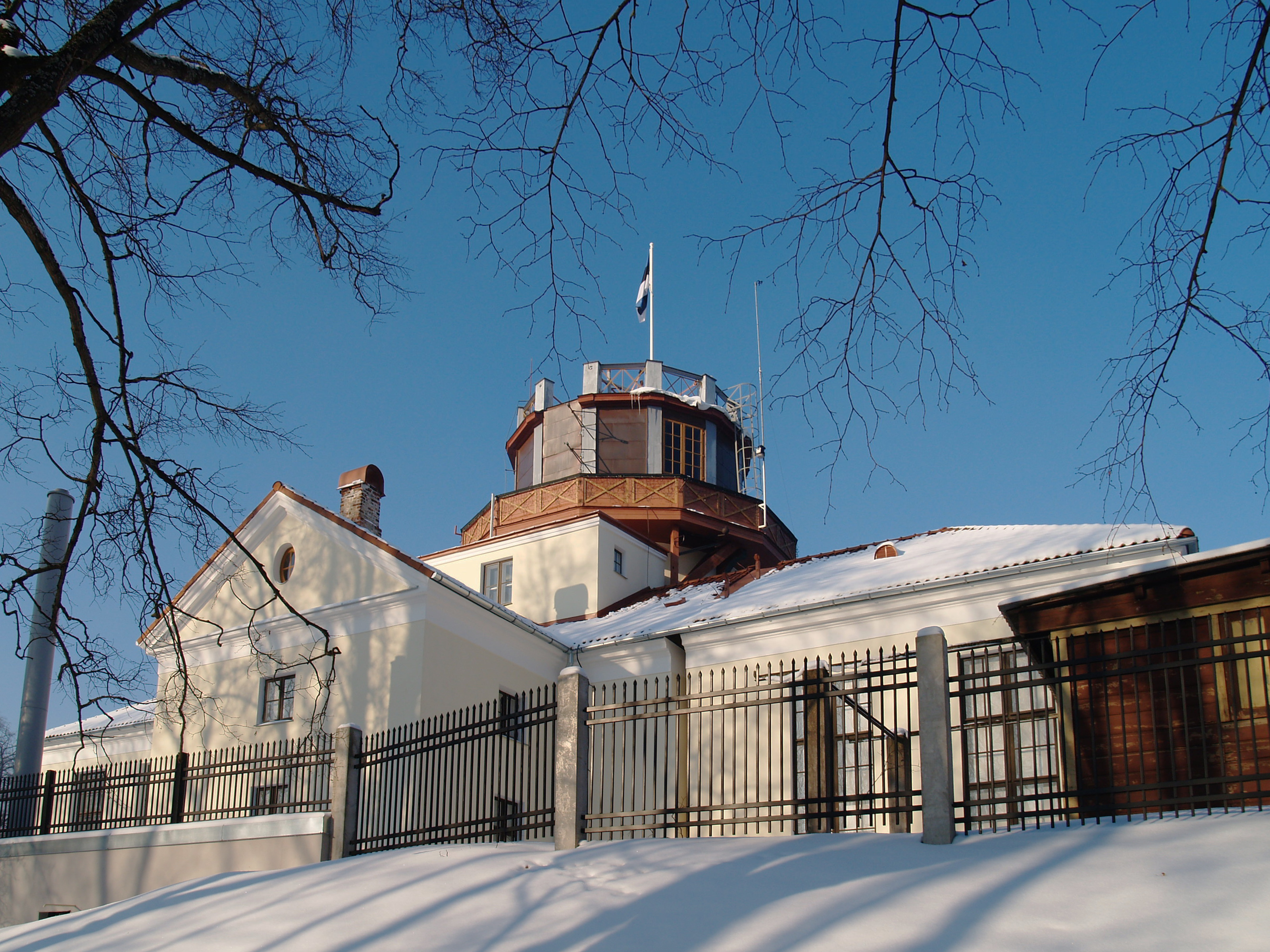 Tartu Tähetorn